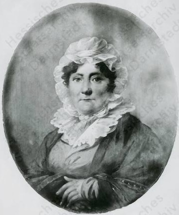 Hauke, Maria Salome geb. Schweppenhäuser (1751-1833) / Porträt, mit Haube, Brustbild in Medaillon